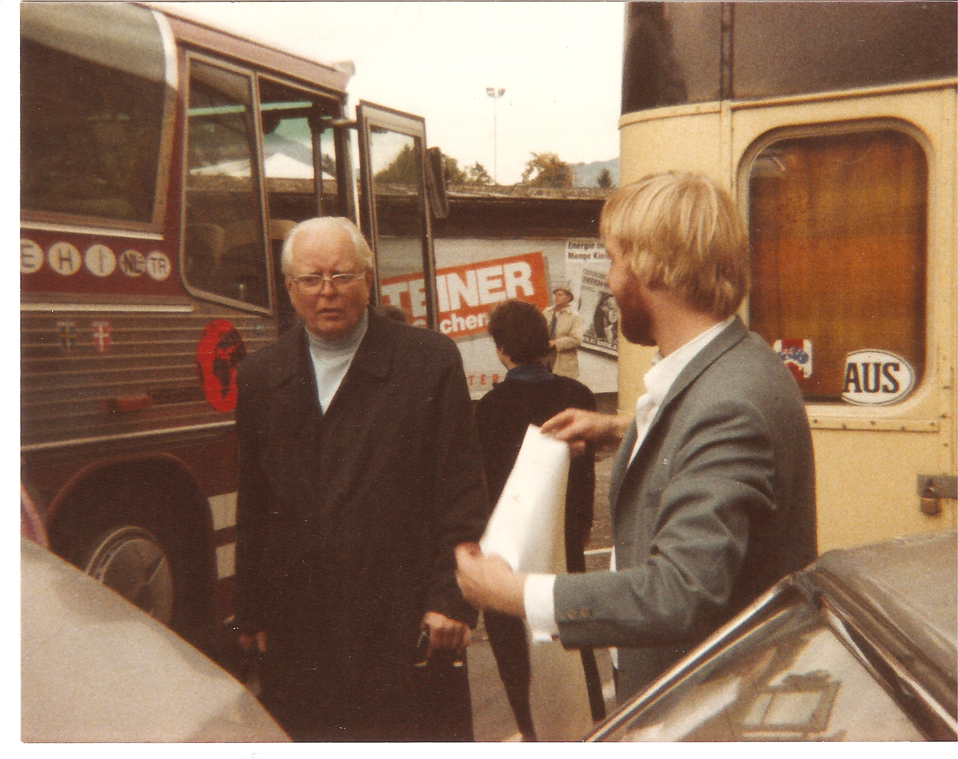 Egon Krauss wird das Platkat zur Orgeleinweihung in Nonntal 1984 gezeigt